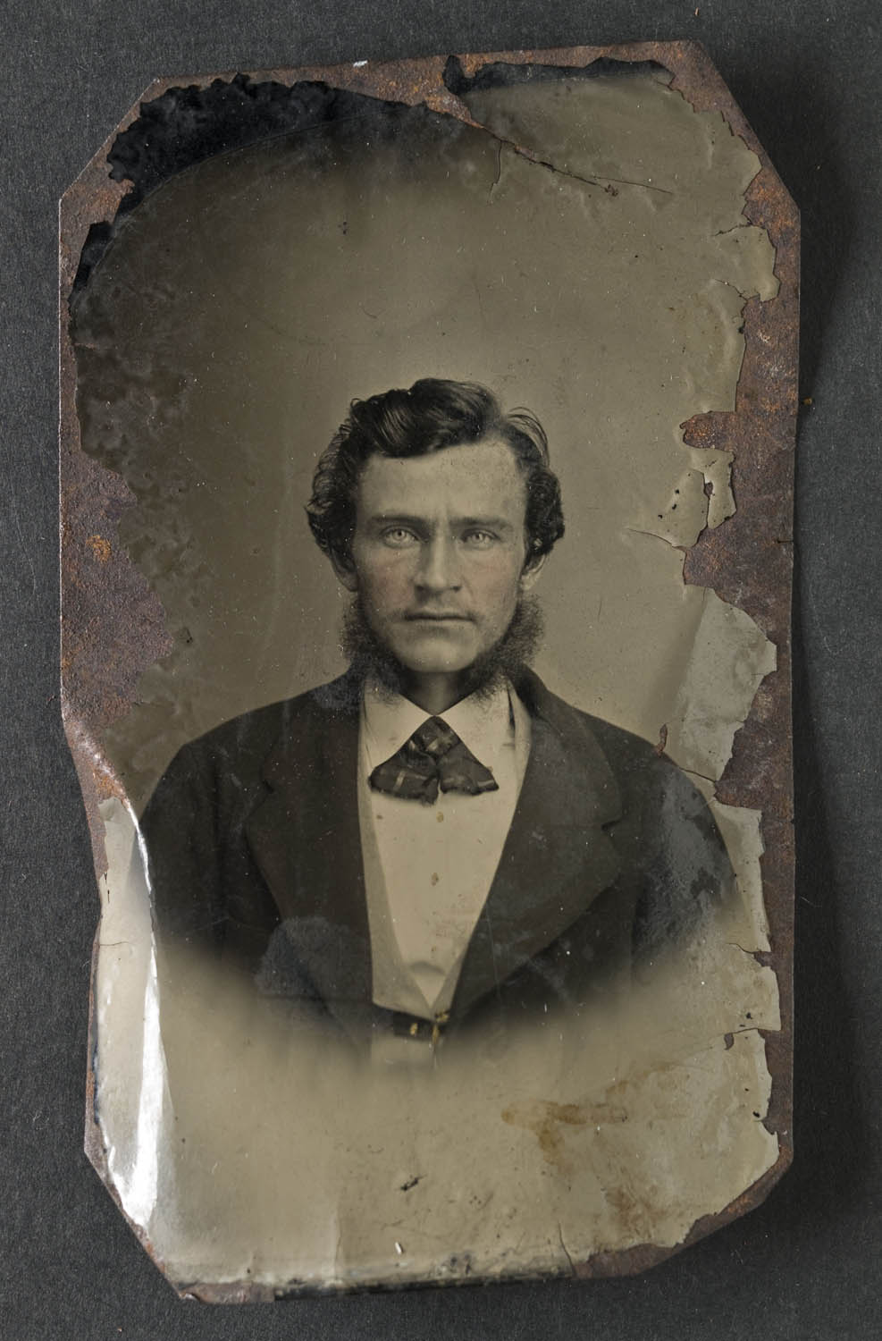 Porträtt, midjebild, av man med yviga polisonger. Iklädd svart jacka och vit skjorta. Handkolorerad, skjortknapparna förgyllda. Ferrotyp. 1850-1870-tal. Nordiska museet inv.nr 194139